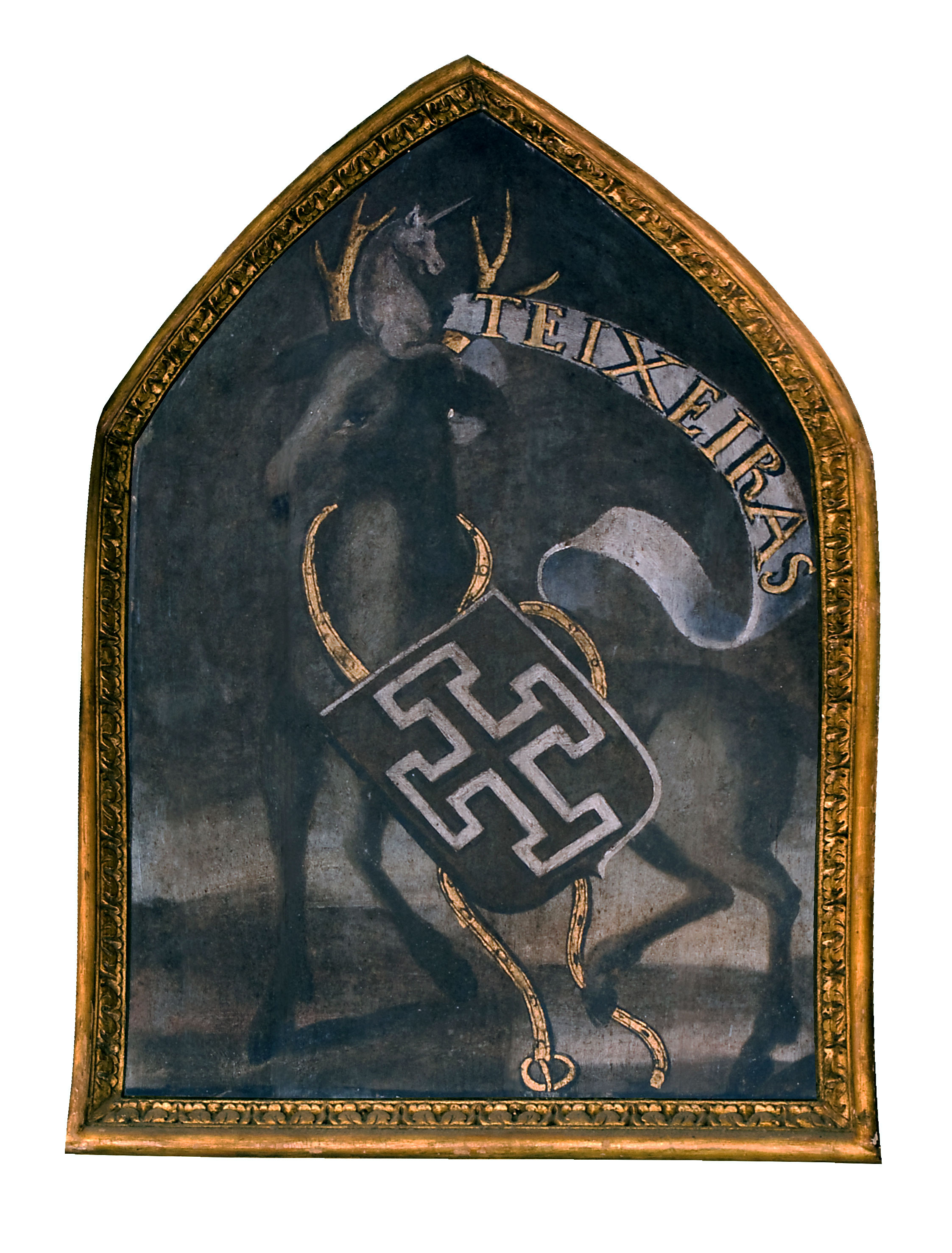 Foto da imagem do brasão, conforme pintada no teto da Sala de Brasões do Palácio Nacional de Sintra.